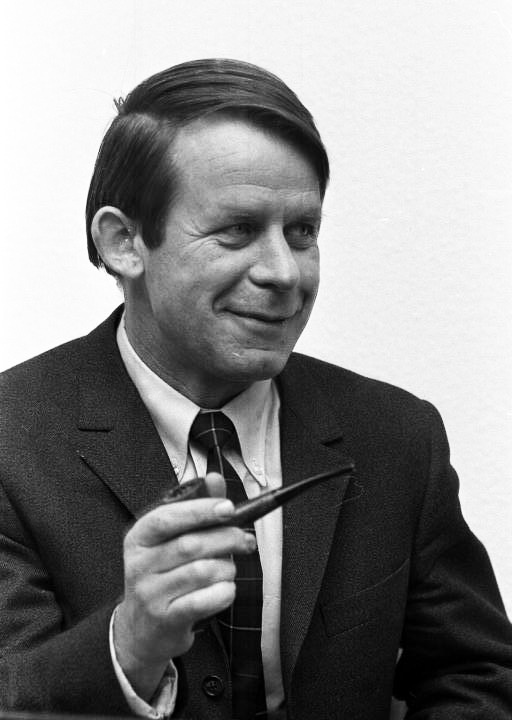 Dichterlesung Siegfried Lenz in der Landesvertr. Hamburg